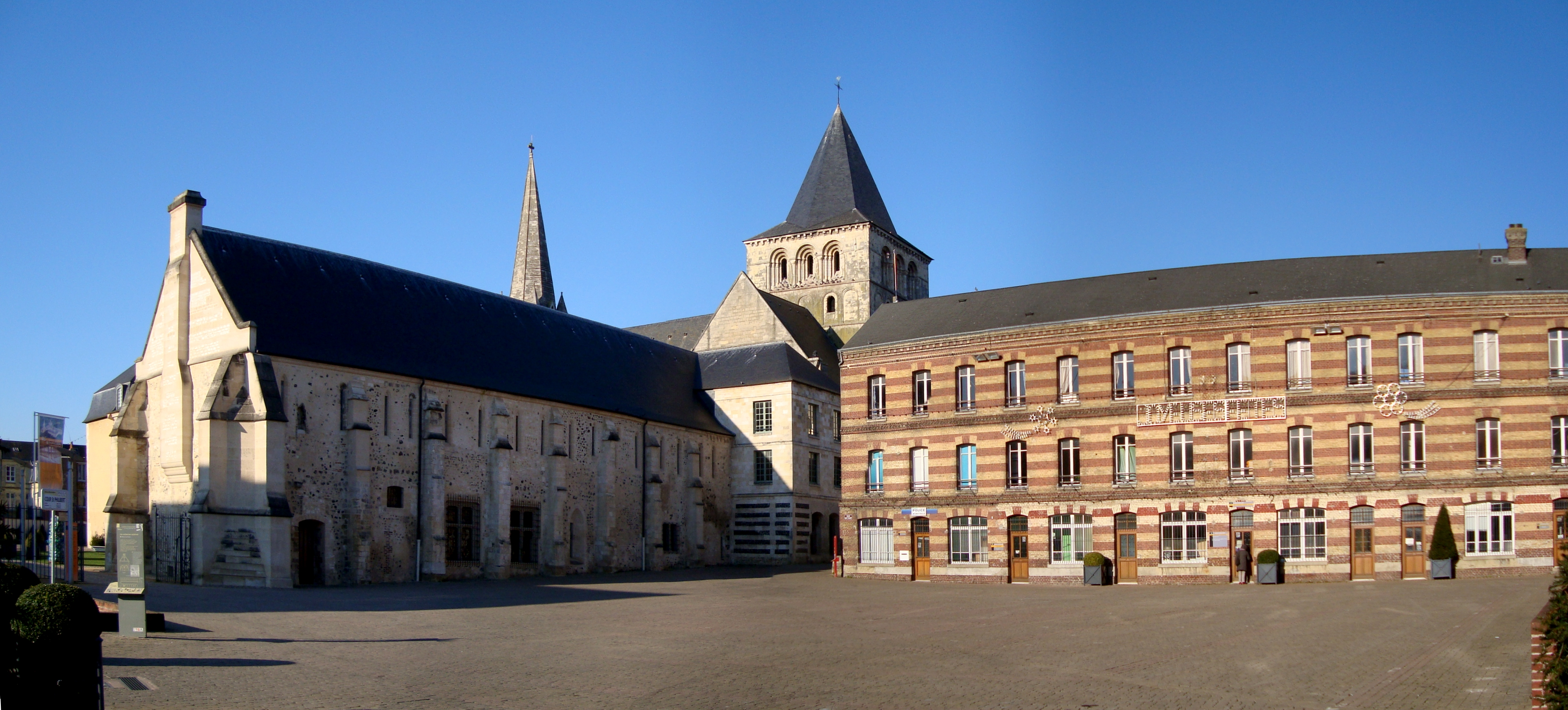 L'abbaye bénédictine de Montivilliers (Seine-Maritime).